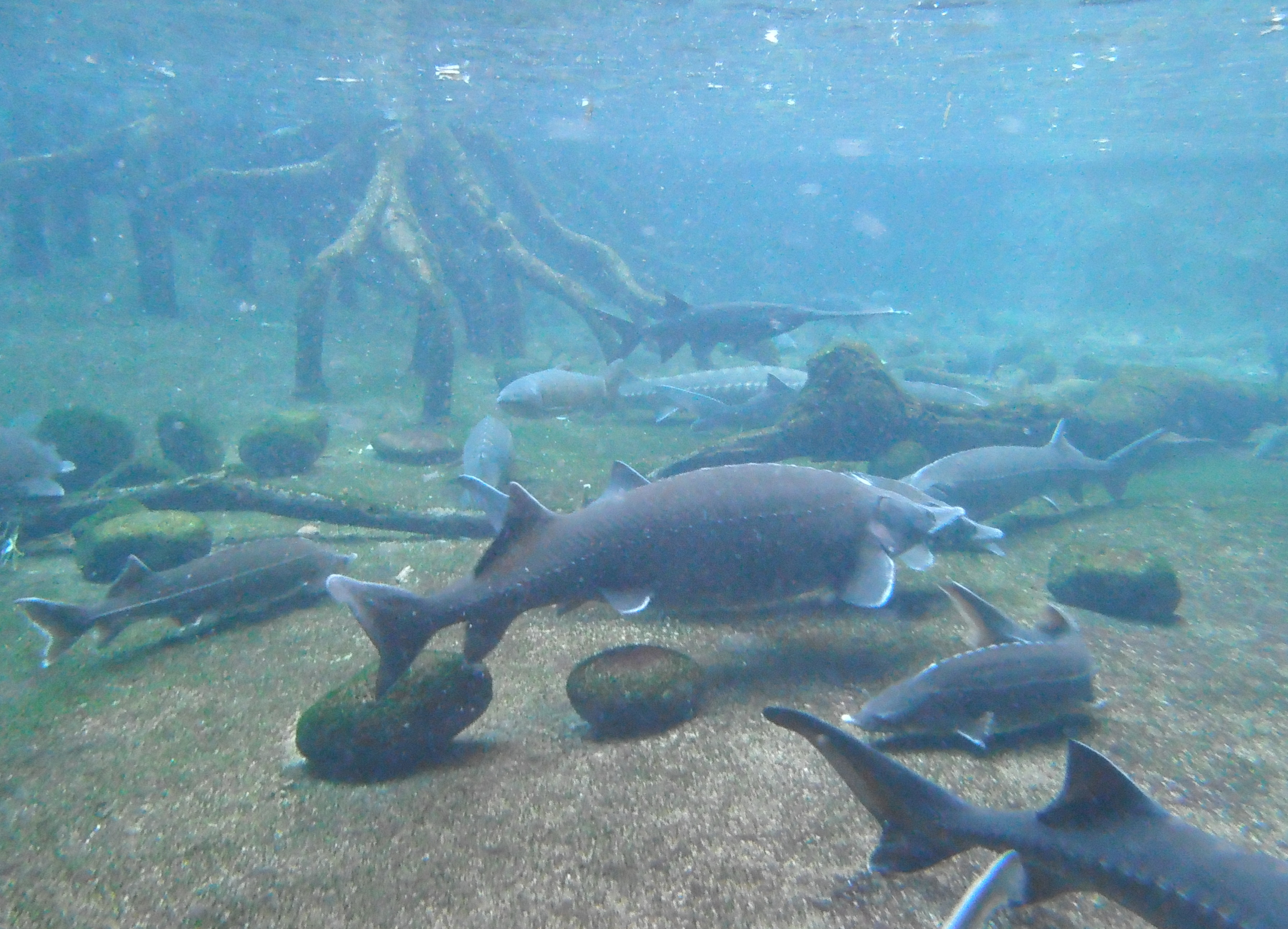 Vasca degli Acipenseridi (Bioparc di Fuengirola)